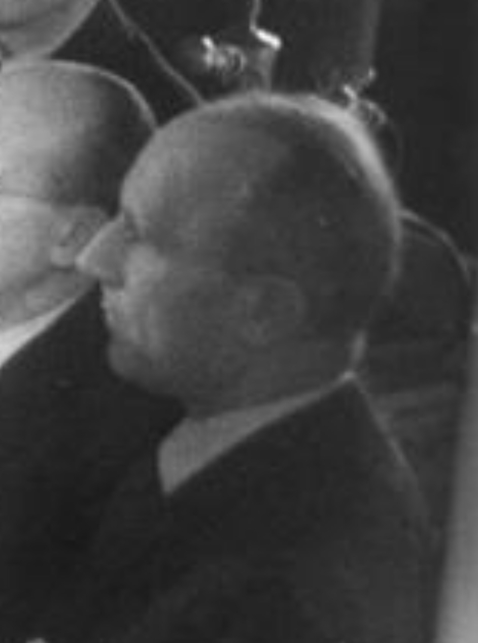 ADN-ZB/Donath Berlin: 1. Stadtverordnetensitzung am 26.11.1946 im Saal des Neuen Stadthauses in der Parochialstraße, UBz.: Oberbürgermeister Dr. Ostrowski (SPD) während der Vereidigung. 1.v.r.: Dr. Friedensburg, 3.v.r.: Luise Schröder. Wahl der 1. Stadtverordneten am 10.10.1946.